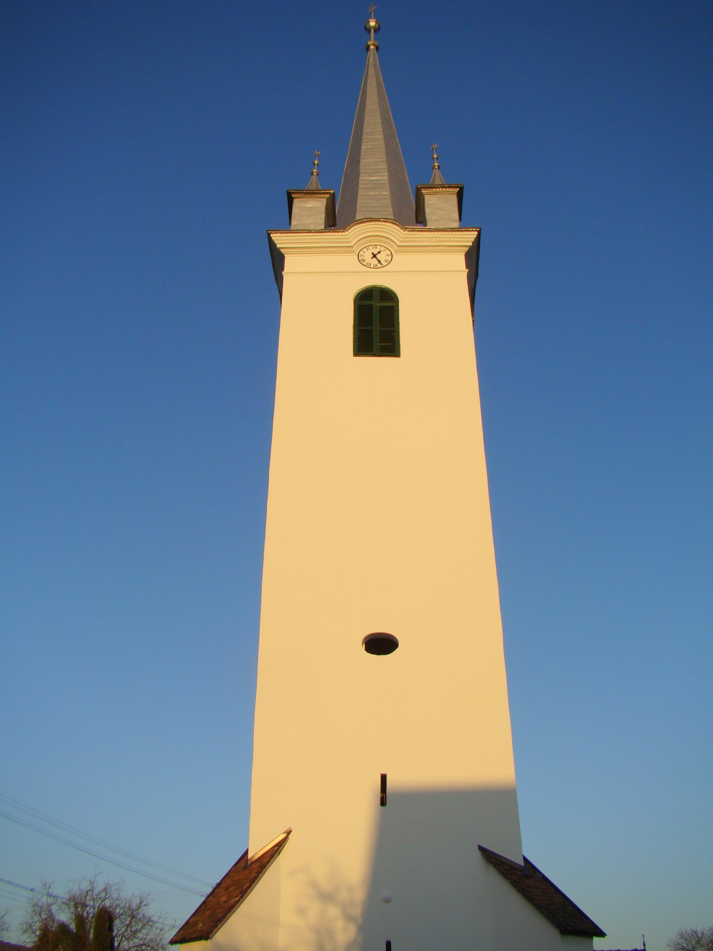 Biserica reformată, sat Sărățeni; comuna Sărățeni 01